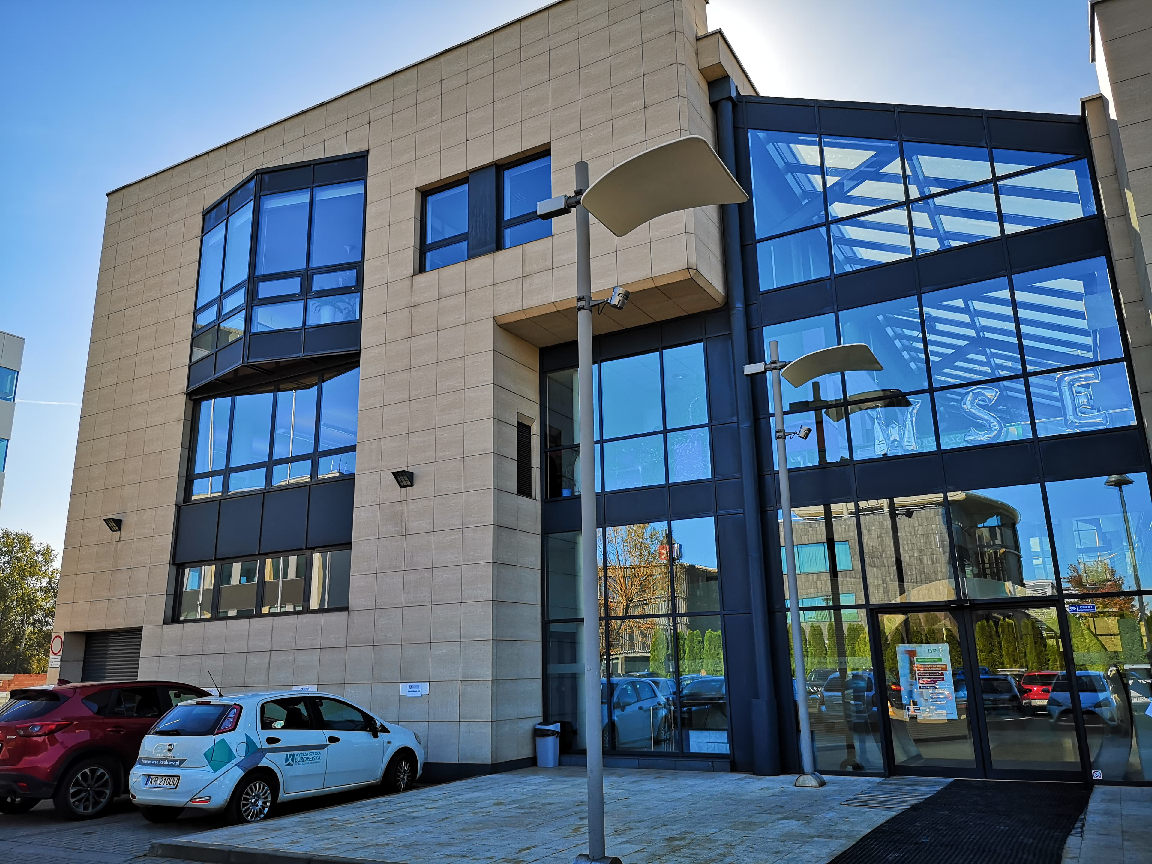 Nowa siedziba WSE od 3 września 2018 r.